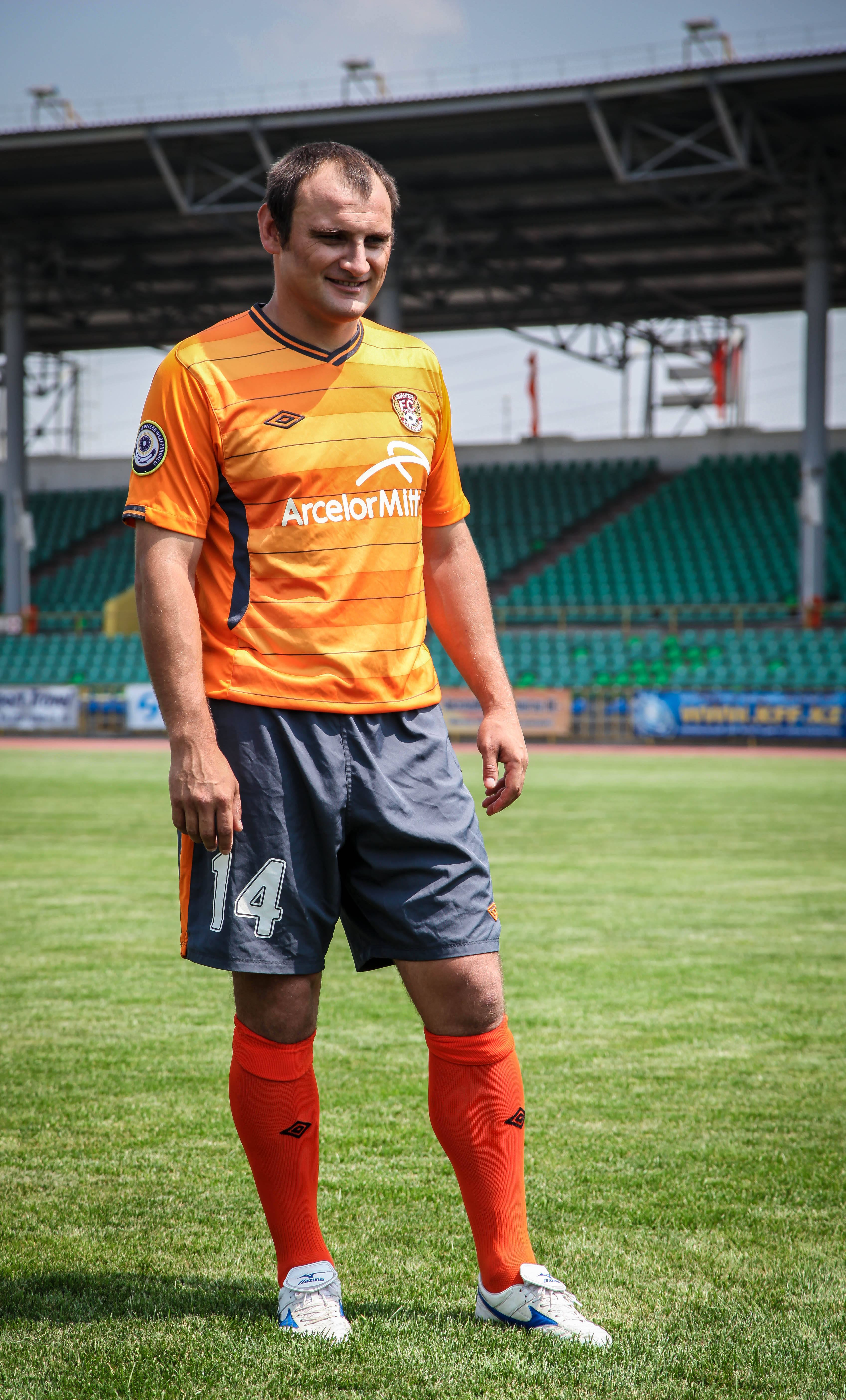 фотограф Андрей Шангин